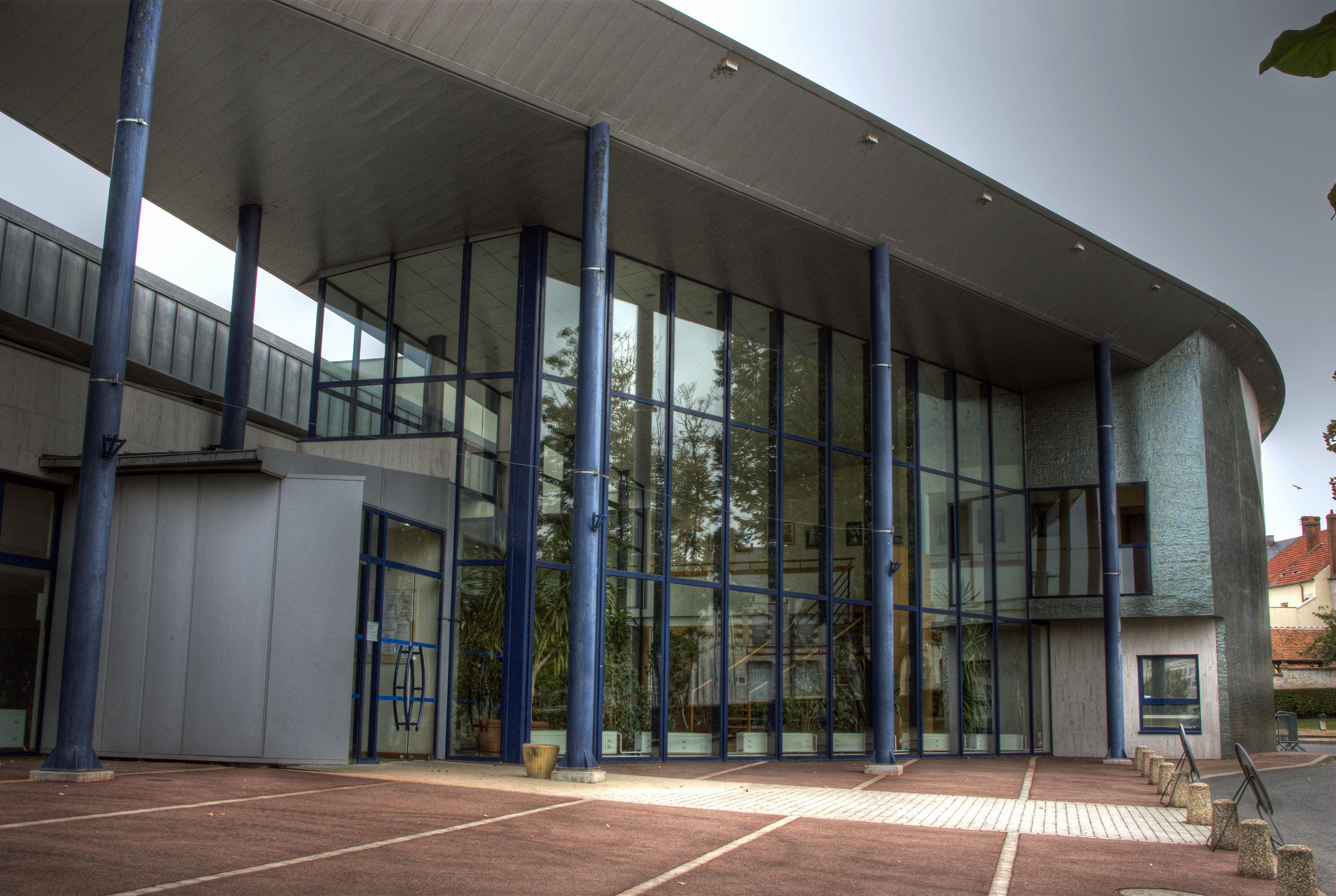 Centre socio-culturel de Briare, Loiret, Centre, France